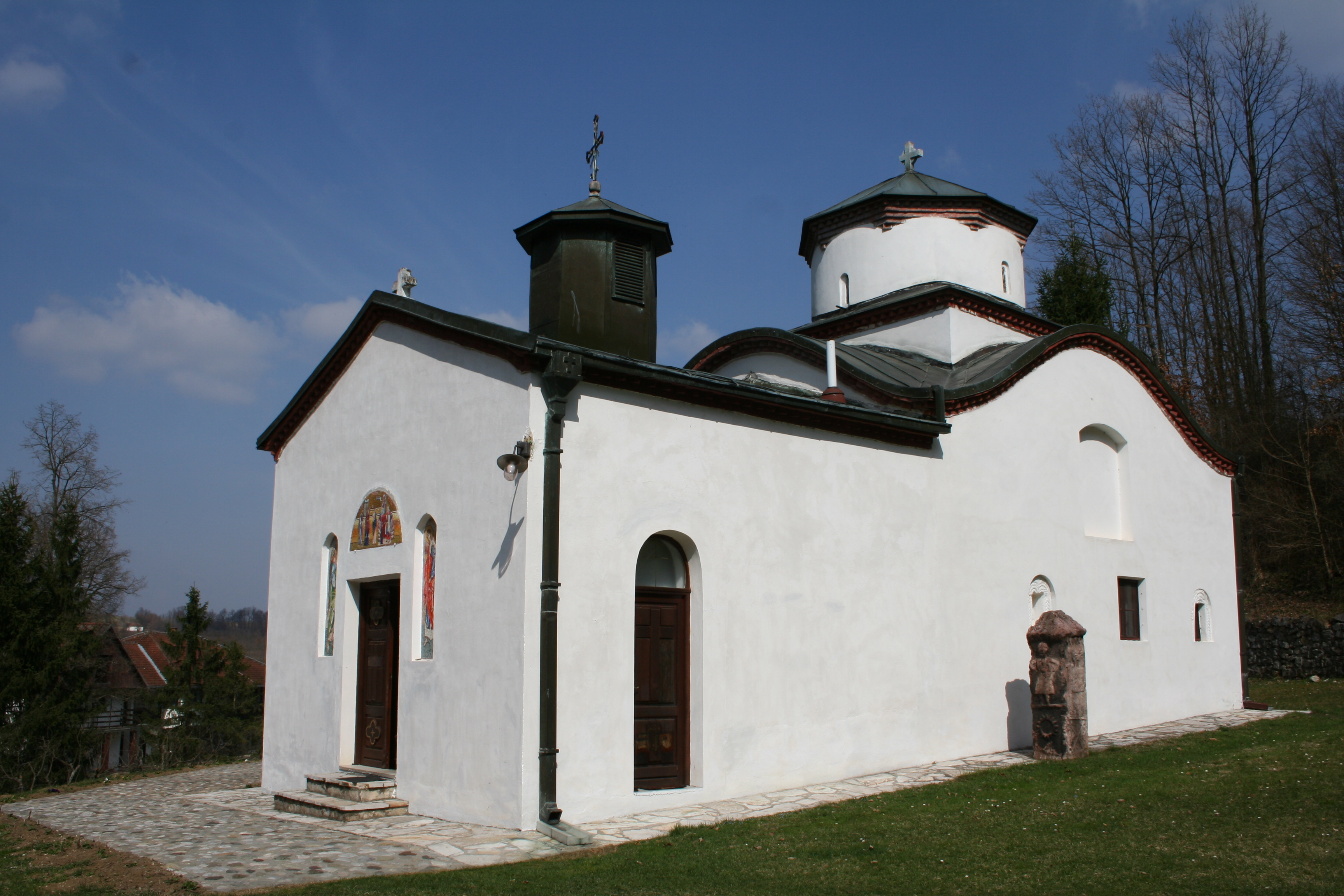 Manastir Dokmir